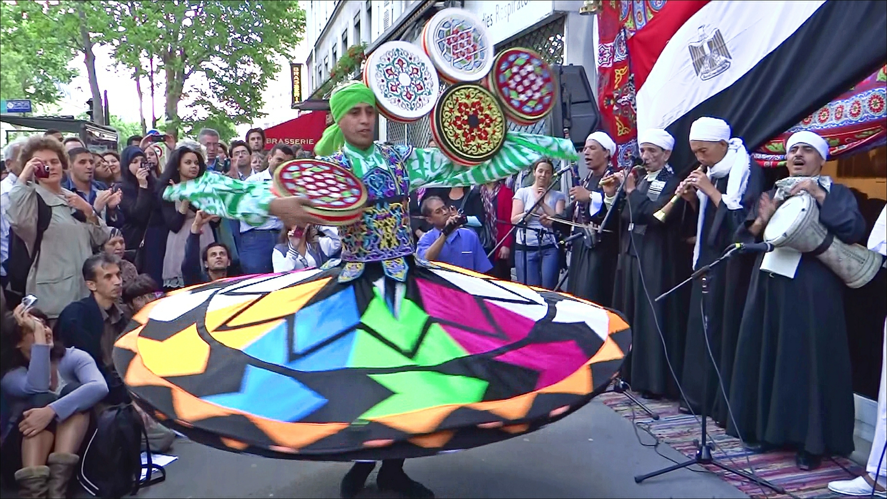 Derviche accompagné par les Percussions nubiennes (Nubian Drummers) devant le centre culturel d'Egypte Boulevard Saint Michel, Paris Fête de la musique 2012 Site du centre culturel d'Egypte (Paris)